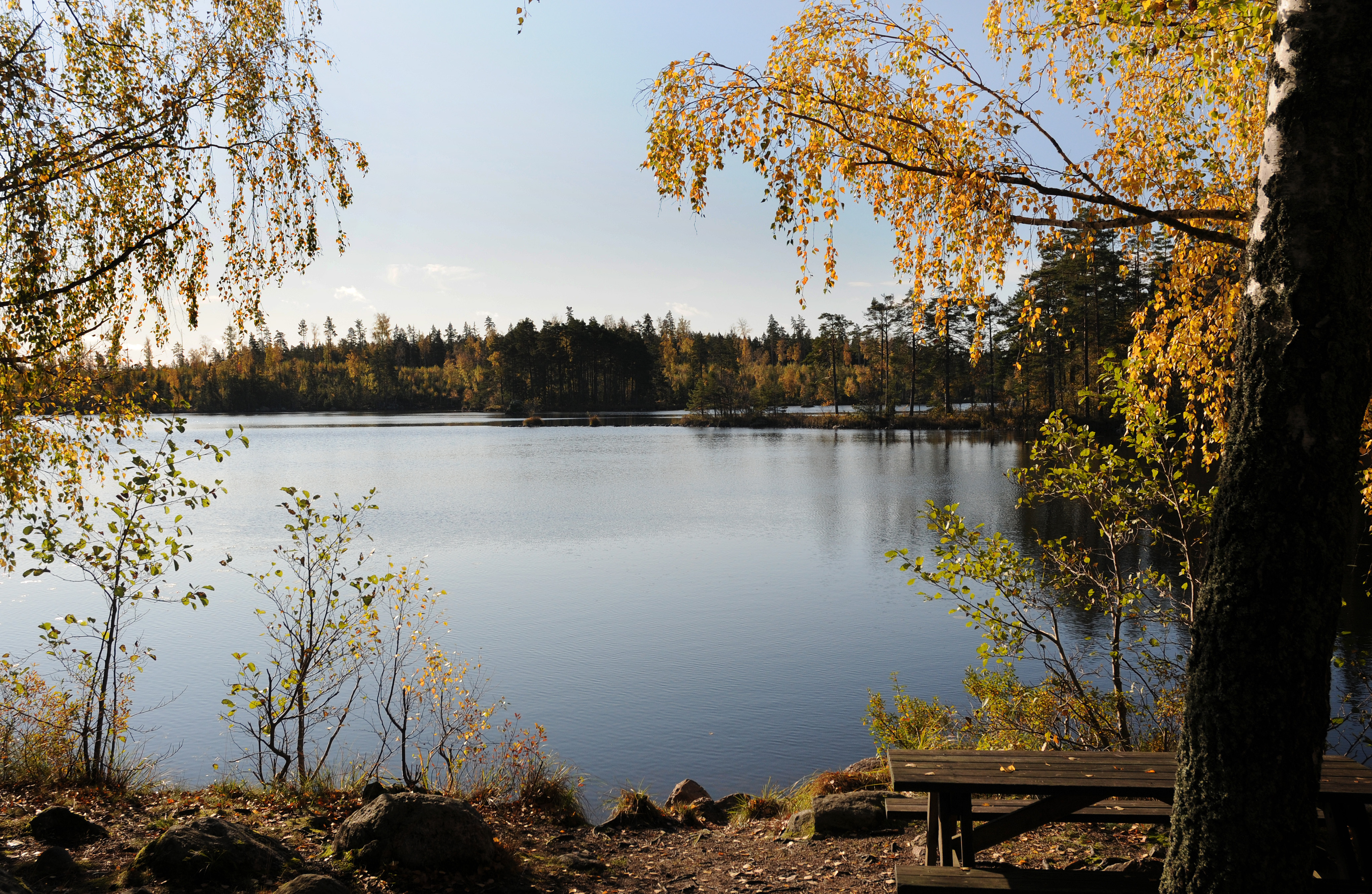 Sjön Ältaren i Flens kommun, Södermanland